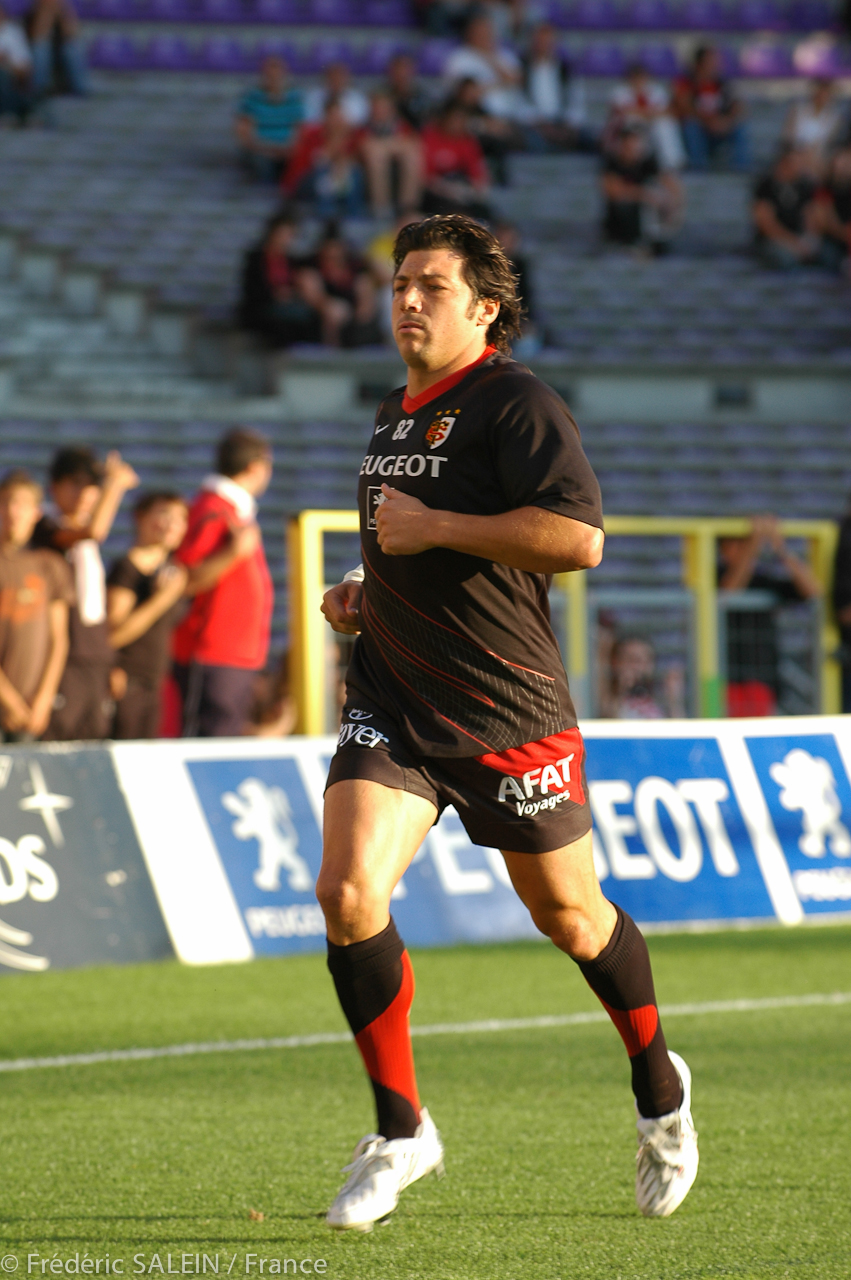 3ème match Le 7 septembre 2008 A Toulouse (Stadium) Stade Toulousain bat Biarritz 20 à 6 (mi-temps : 10-3)